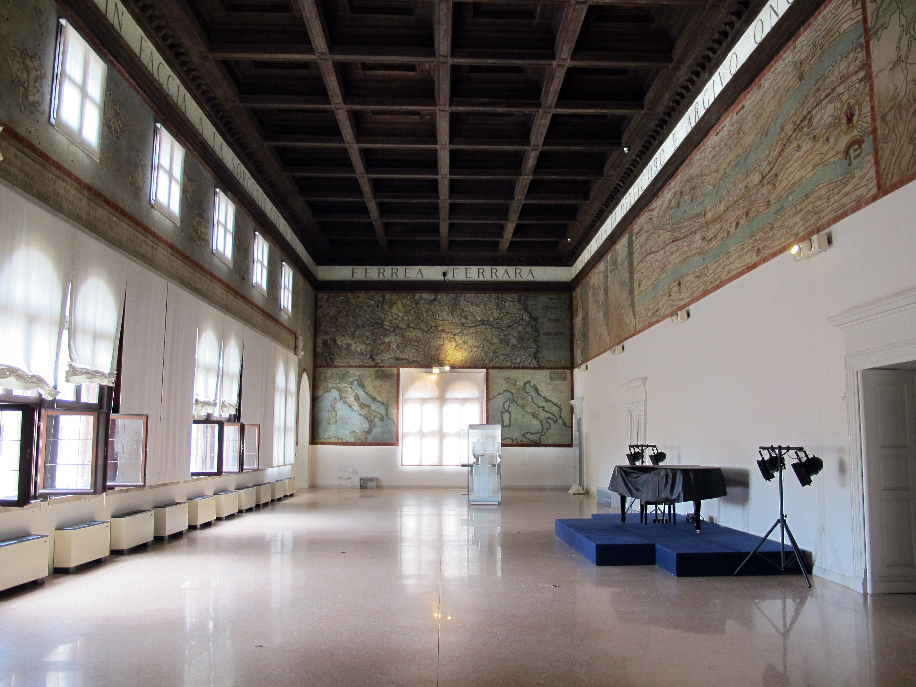 Museo Archeologico Nazionale - MIBAC This is a photo of a monument which is part of cultural heritage of Italy.